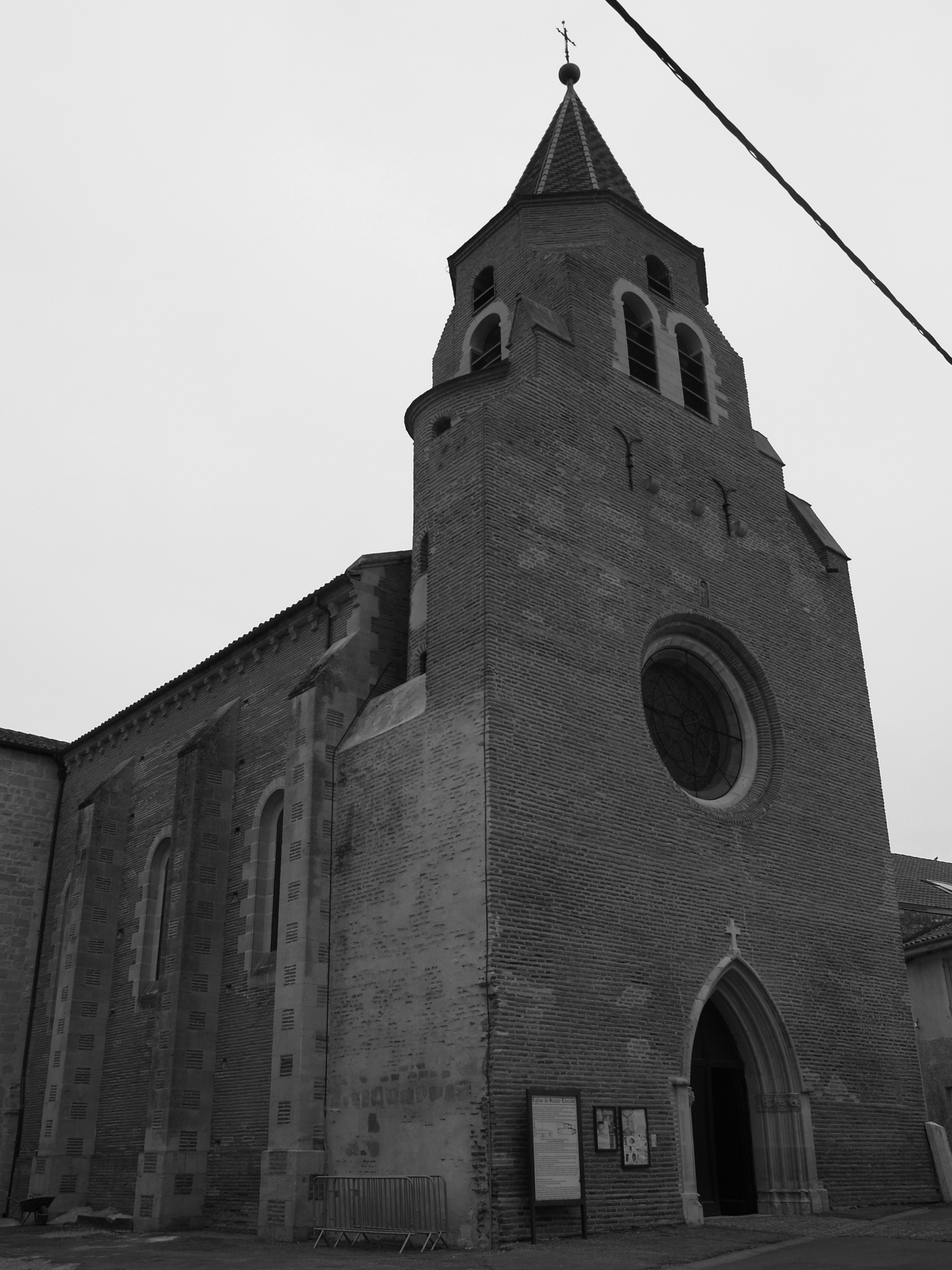 l'église de Sainte Livrade .